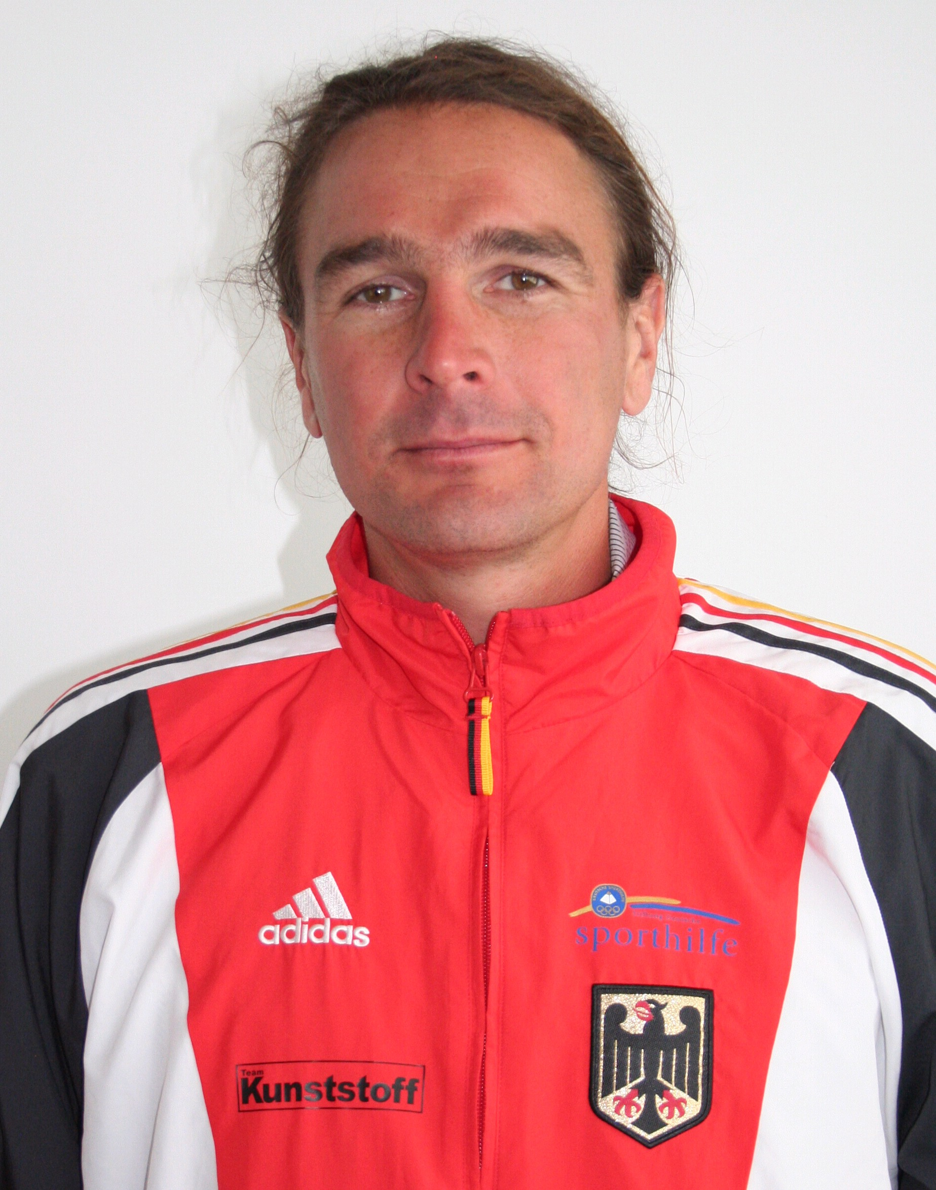 Bundestrainer beim Deutschen Kanu-Verband, zweifacher Silbermedaiellengewinner bei Olympischen Spielen im Vierer-Kajak